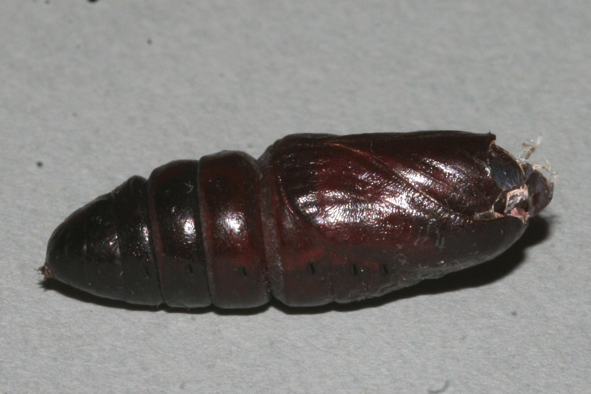 Puppe des Gelbbraunen Zahnspinners (Notodonta torva)